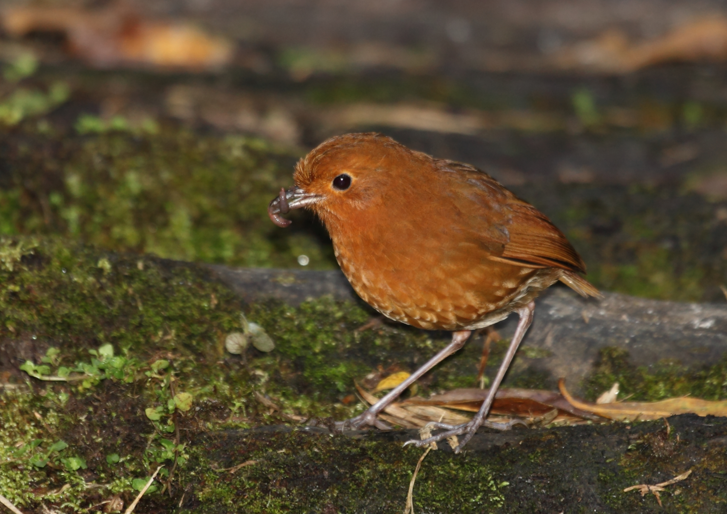 Rufous Antpitta, Tapichalaca, Ecuador